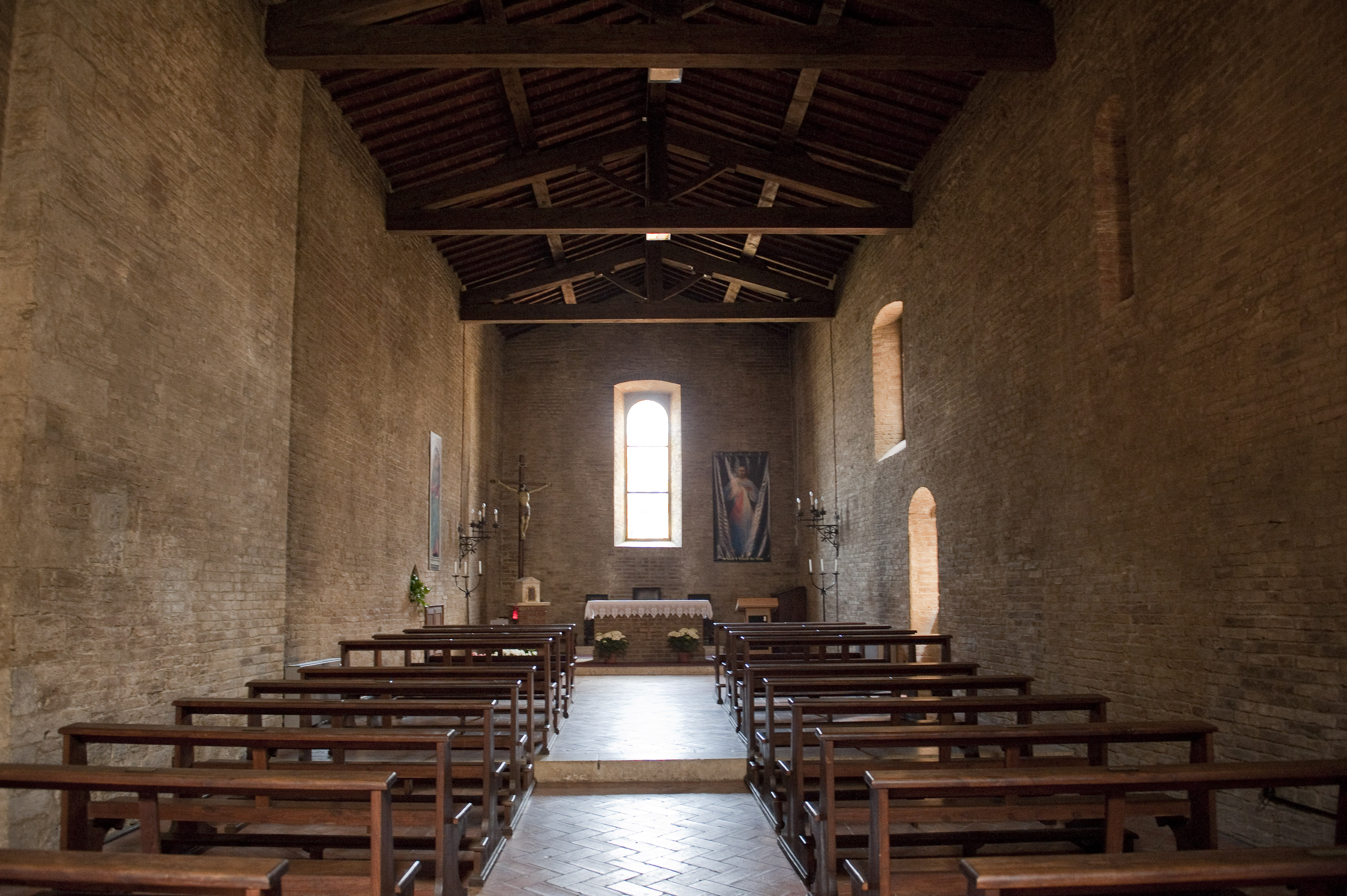 Interno della chiesa di San Bartolo a San Gimignano